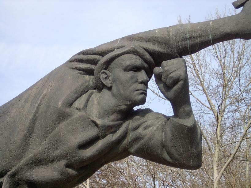 Denkmal für deutsche Spanienkämpfer (1967/8) von Fritz Cremer (Ausschnitt)